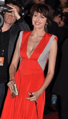 Valérie Bonneton à la cérémonie des César